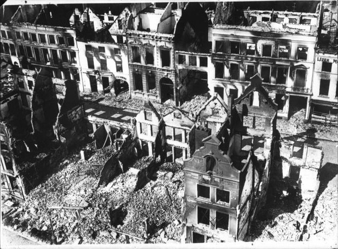 Vue aérienne de la ville de Termonde après le bombardement et l'incendie.